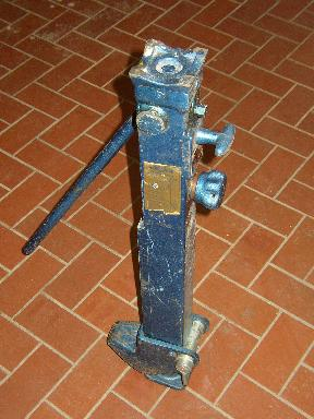 Hydraulikheber wie er bei der Feuerwehr und THW im Einsatz ist. (Hydraulikheber)